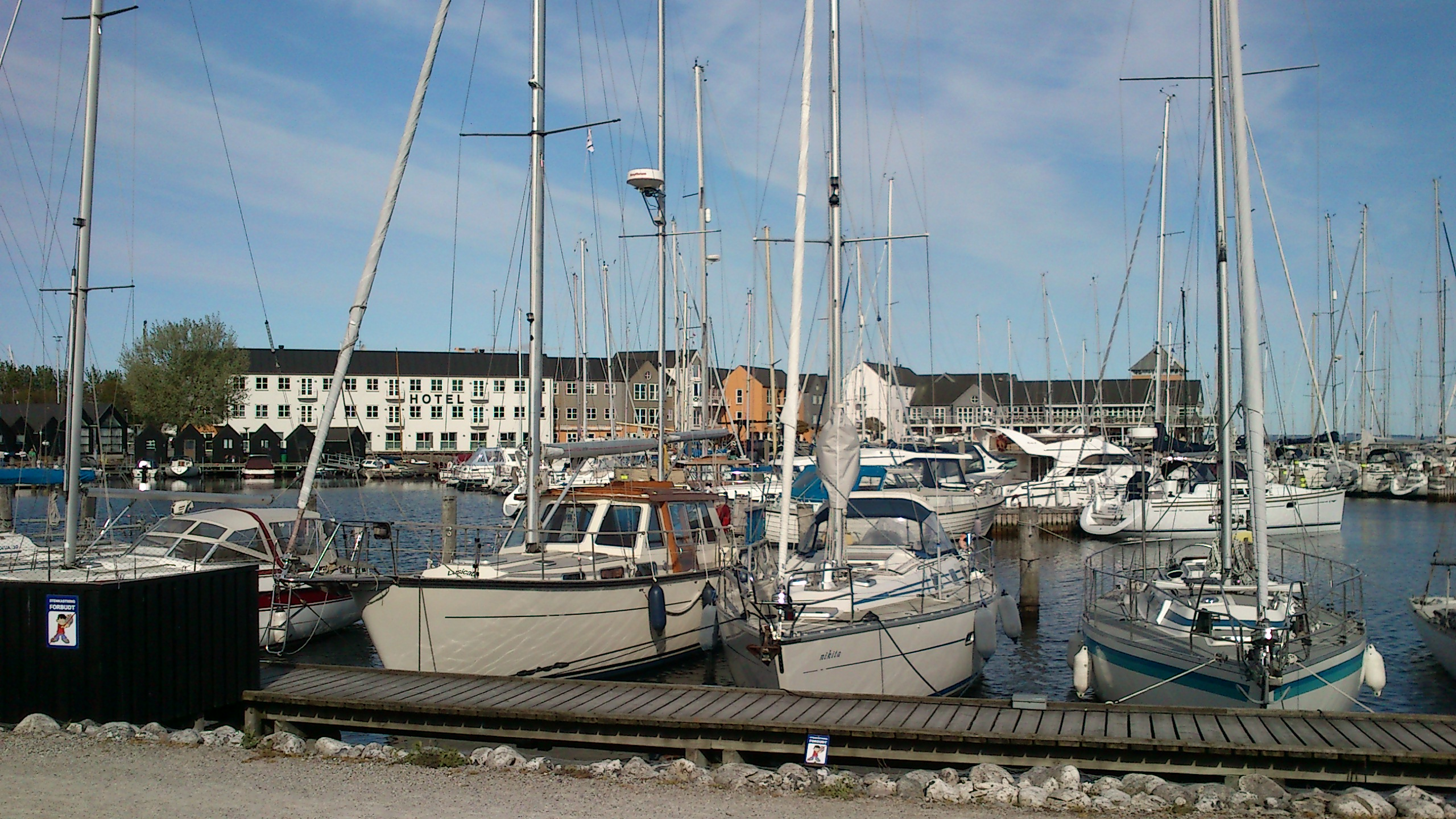 Marselisborg Lystbådehavn